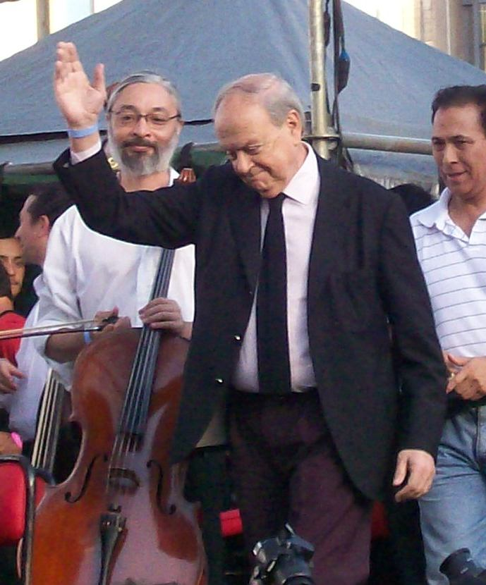 Atilio Stampone es un pianista, arreglador, director y compositor porteño de tangos. Nació en Buenos Aires, en el barrio San Cristóbal, el 1º de julio de 1926.